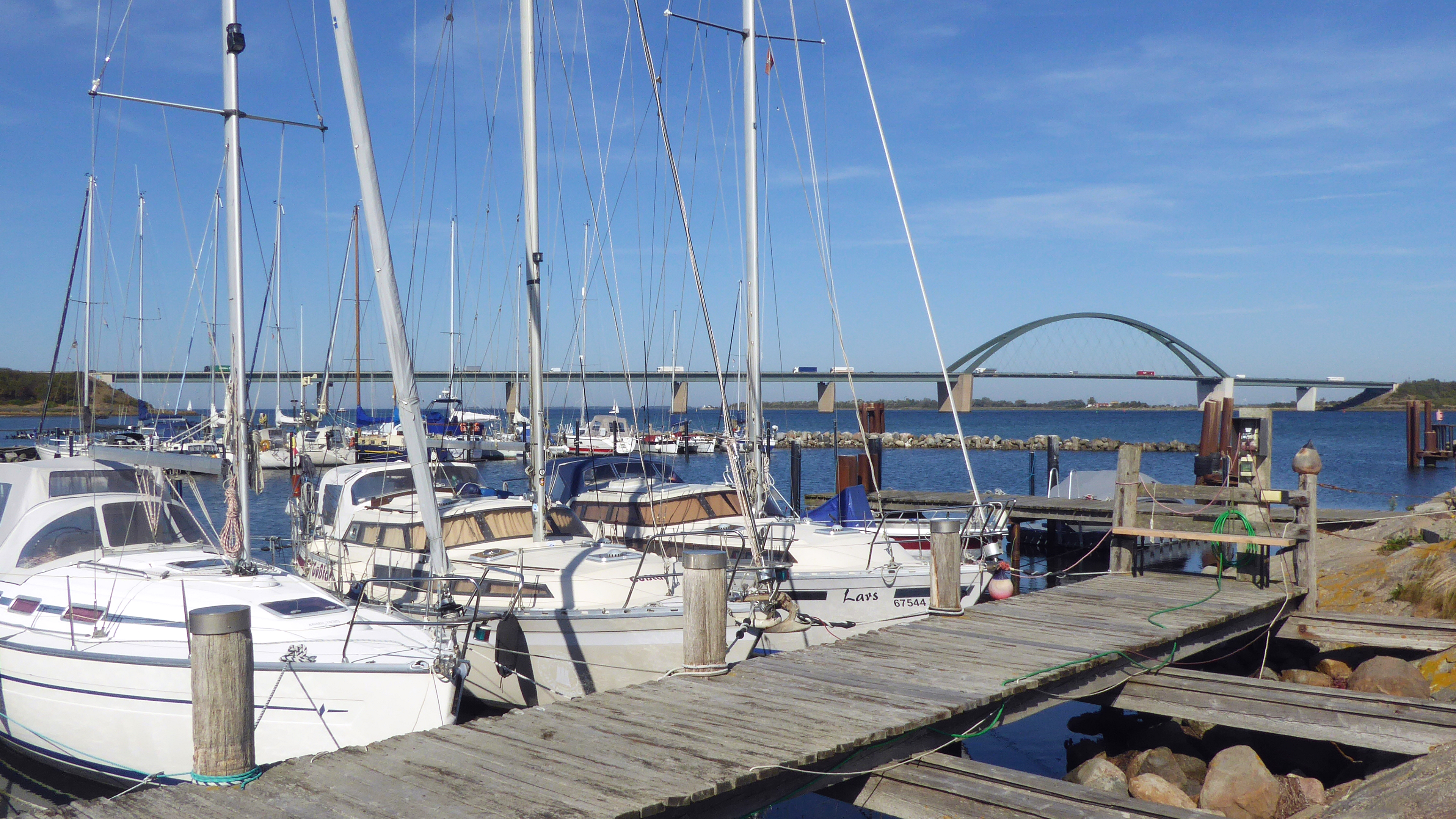 Blick auf den Fehmarnsund mit Fehmarnsundbrücke vom Hafen Großenbrode - Foto 2018 © Wolfgang Pehlemann P1270004